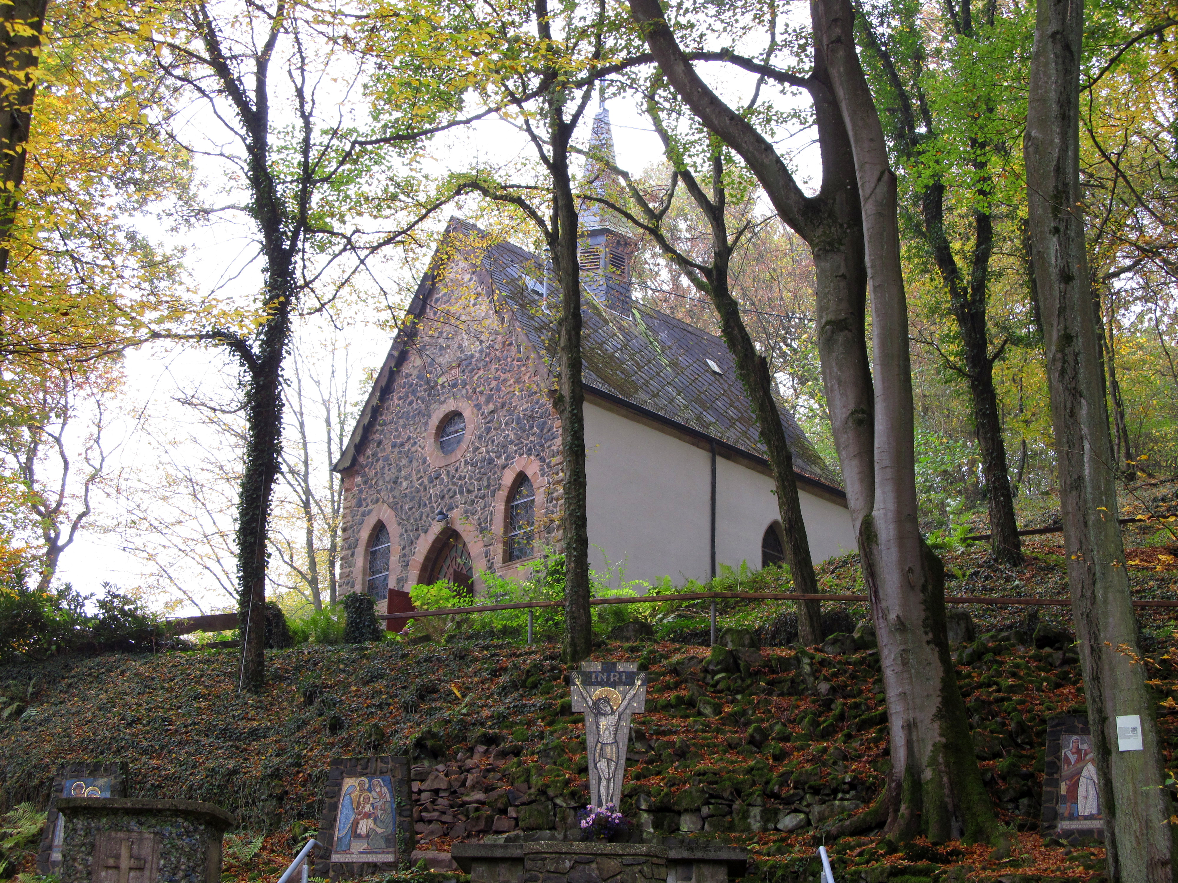 Marienkapelle am Höchsten bei Steinbach, einem Stadtteil von Lebach, Landkreis Saarlouis, Saarland